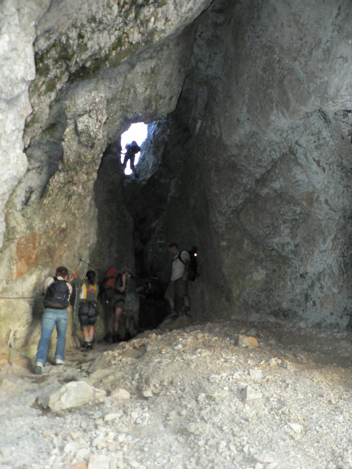 Lamsenspitze Brudertunnel Foto J-P Donzey